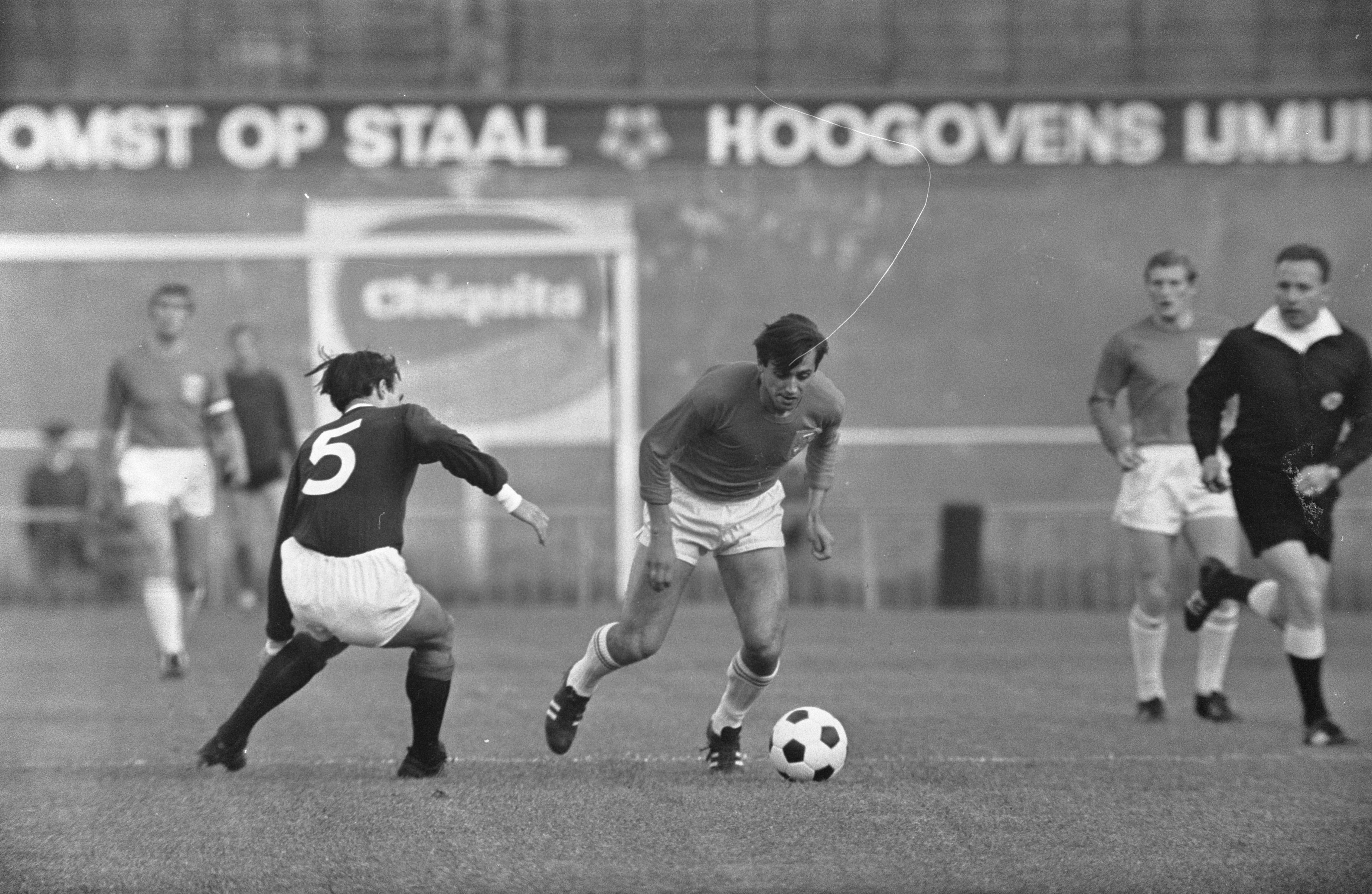 Collectie / Archief : Fotocollectie Anefo Reportage / Serie : [ onbekend ] Beschrijving : Nederland tegen Schotland 0-0. Willy van der Kuylen passeert Mac Kinnon Datum : 30 mei 1968 Locatie : Nederland, Schotland Trefwoorden : sport, voetbal Persoonsnaam : Kuylen, Willy van der Fotograaf : Kroon, Ron / Anefo Auteursrechthebbende : Nationaal Archief Materiaalsoort : Negatief (zwart/wit) Nummer archiefinventaris : bekijk toegang 2.24.01.05 Bestanddeelnummer : 921-4037